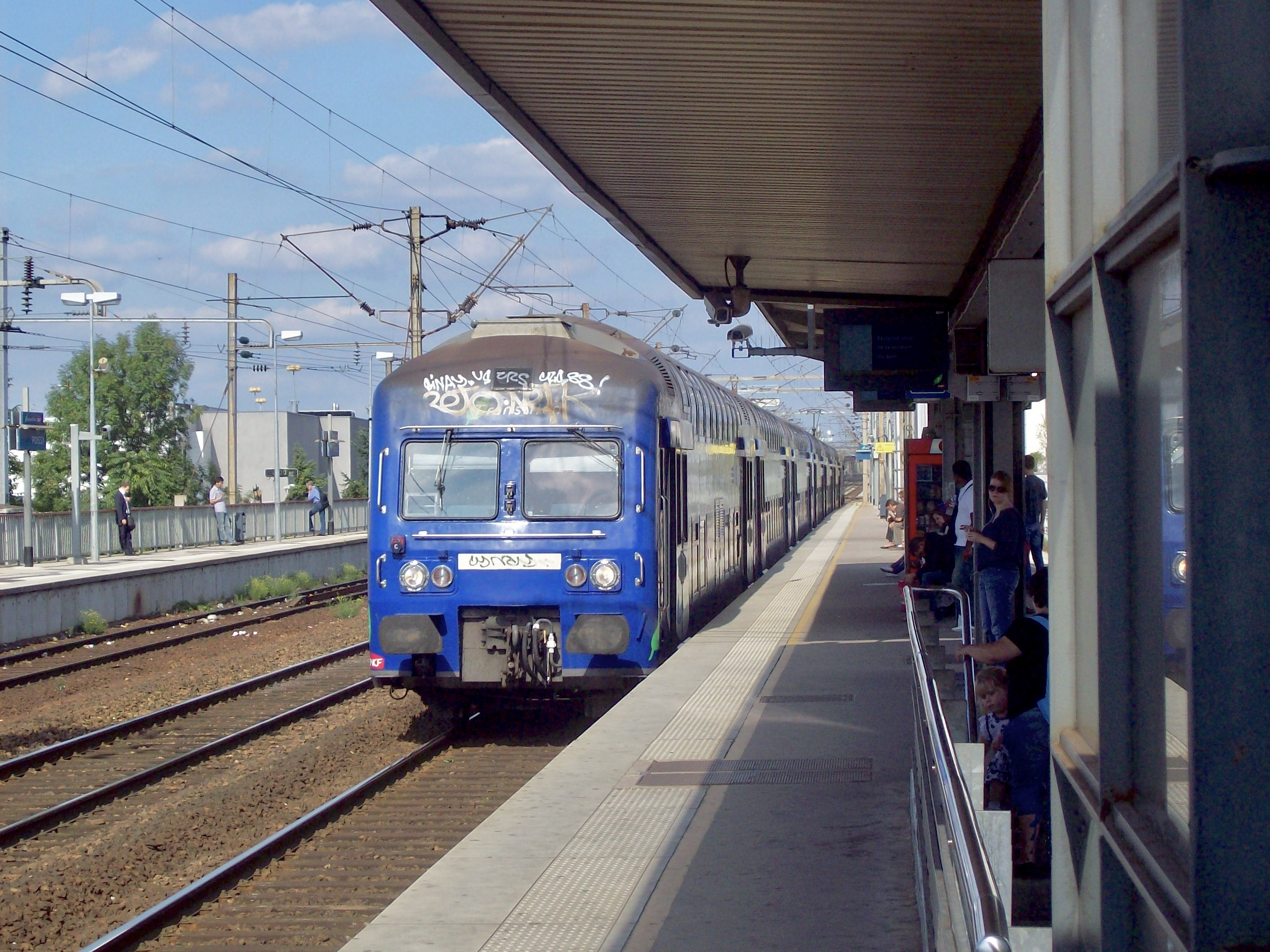 Rame VB2N sans arret en gare de Poissy.